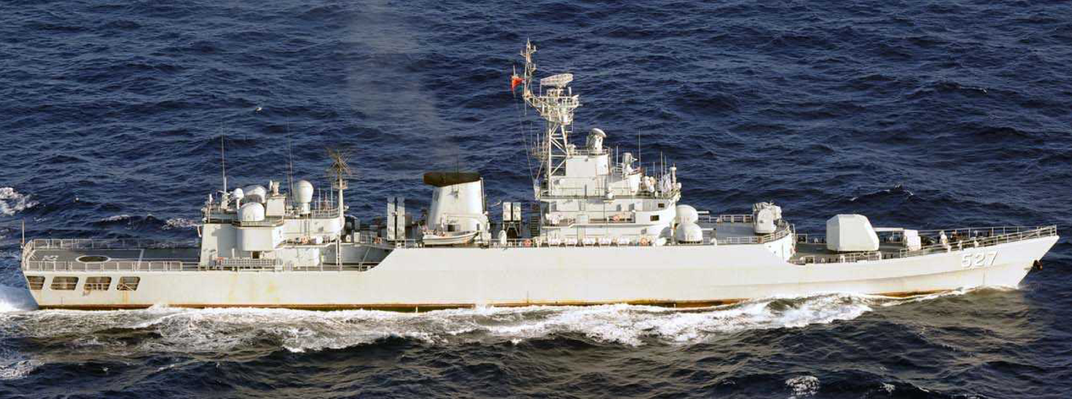 平成２６年７月１２日（土）午前６時頃、海上自衛隊第５航空群所属「Ｐ－３Ｃ」（那覇）及び第１１護衛隊「やまゆき」（横須賀）が、沖縄本島の南西約５４０ｋｍの海域を北東進する中国海軍ジャンカイⅡ級フリゲート１隻、ジャンウェイⅡ級フリゲート１隻及びフチ級補給艦１隻の合計３隻を確認した。 その後、当該艦艇が、沖縄本島と宮古島間を北西進したことを確認した。